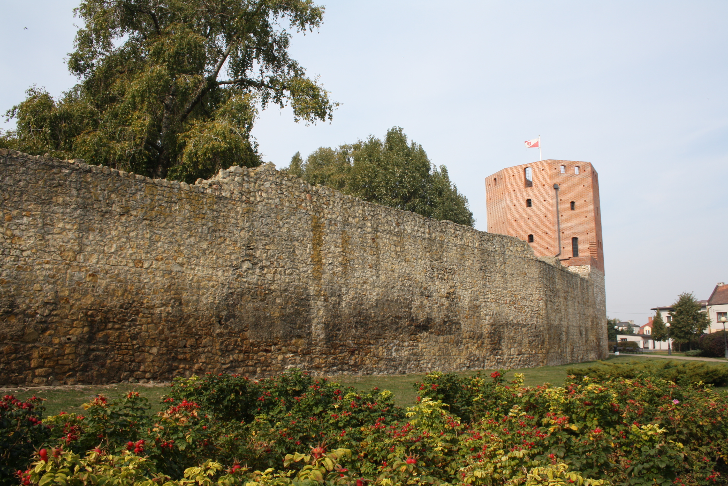 Wieluń, mury obronne (fragment z basztą Swawola), ok. 1350